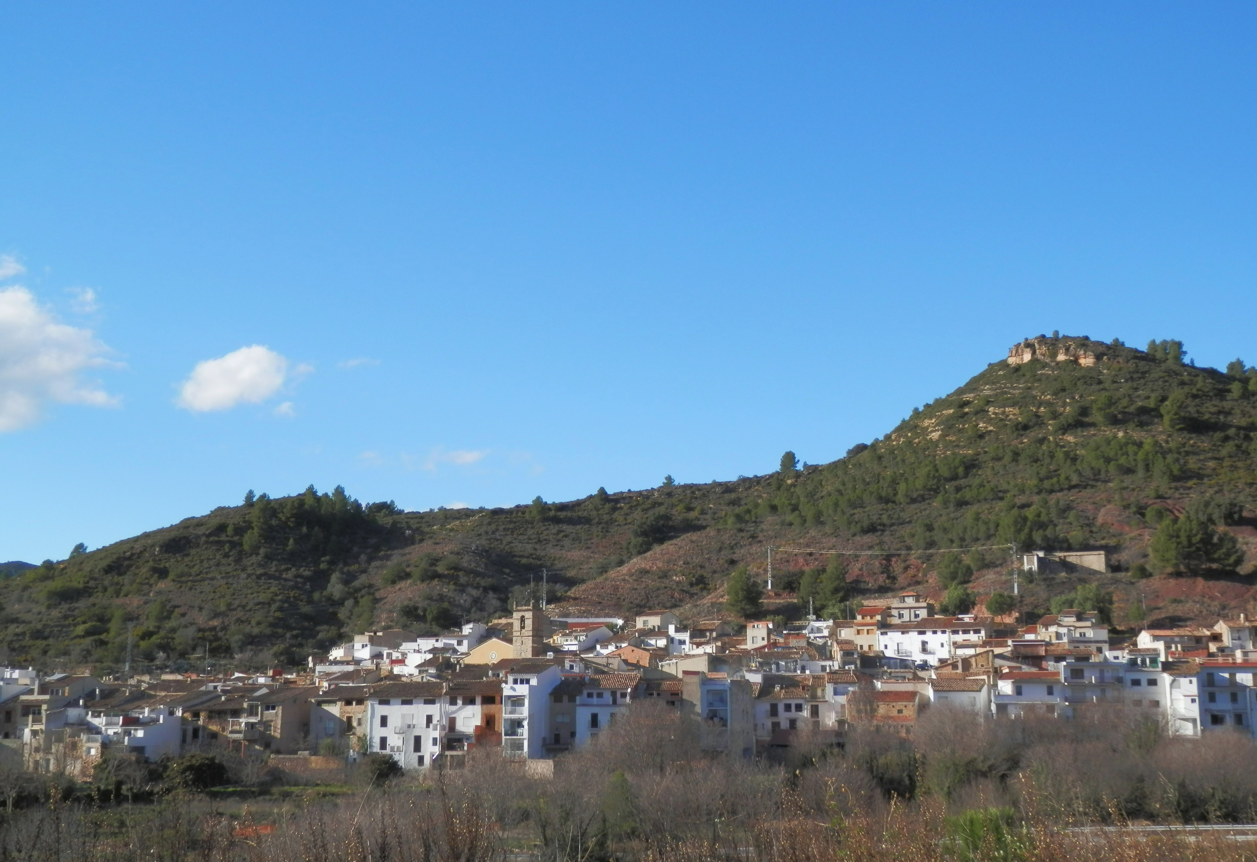 Vista d'Algímia d'Almonesir.